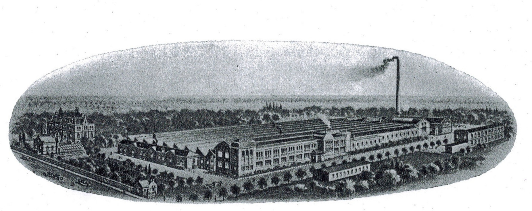 Fabrik Grovermann-Hoppe, früher